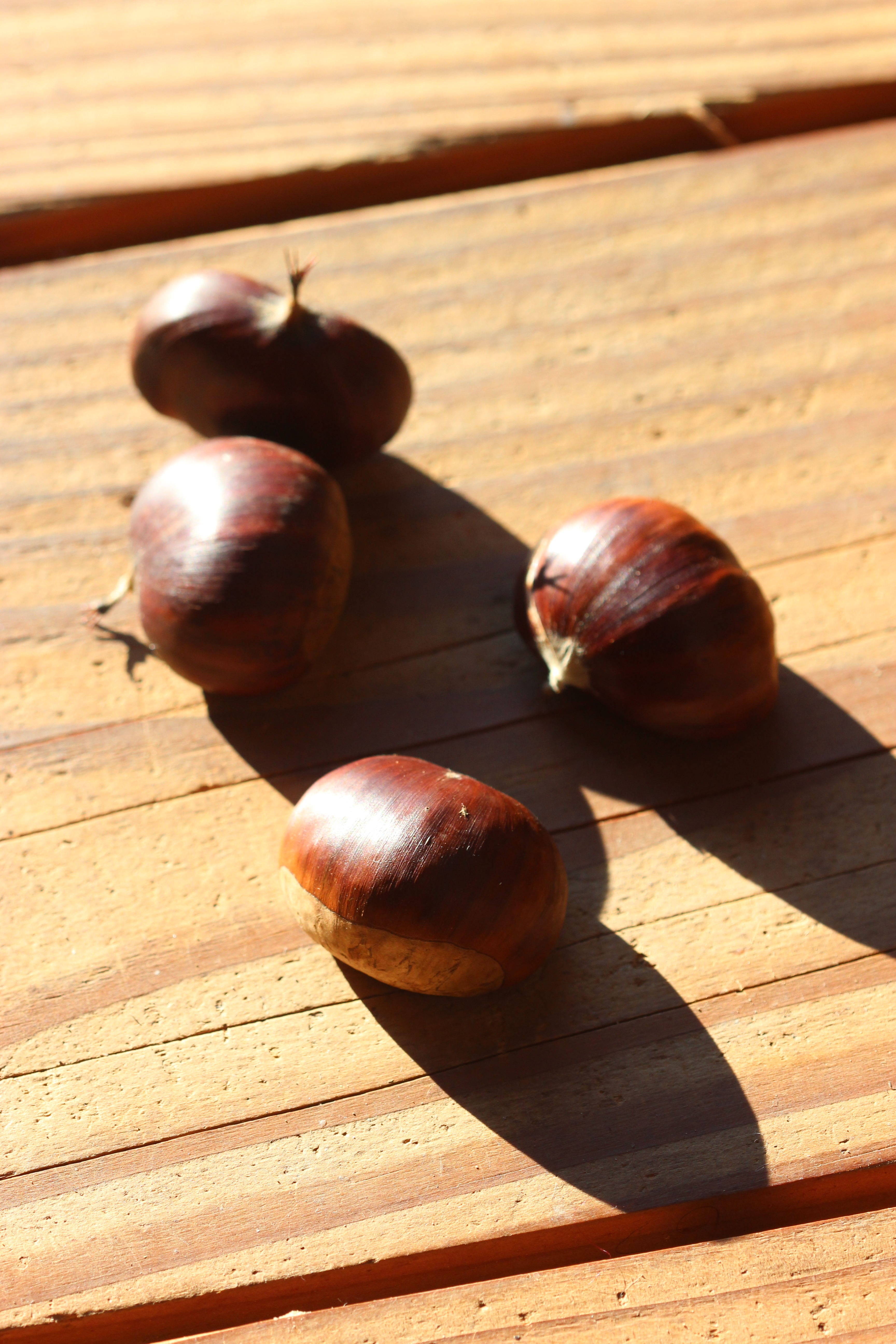 Châtaigne, variété ancienne : Rousse de Saint Léonard de Noblat, Limousin (87).